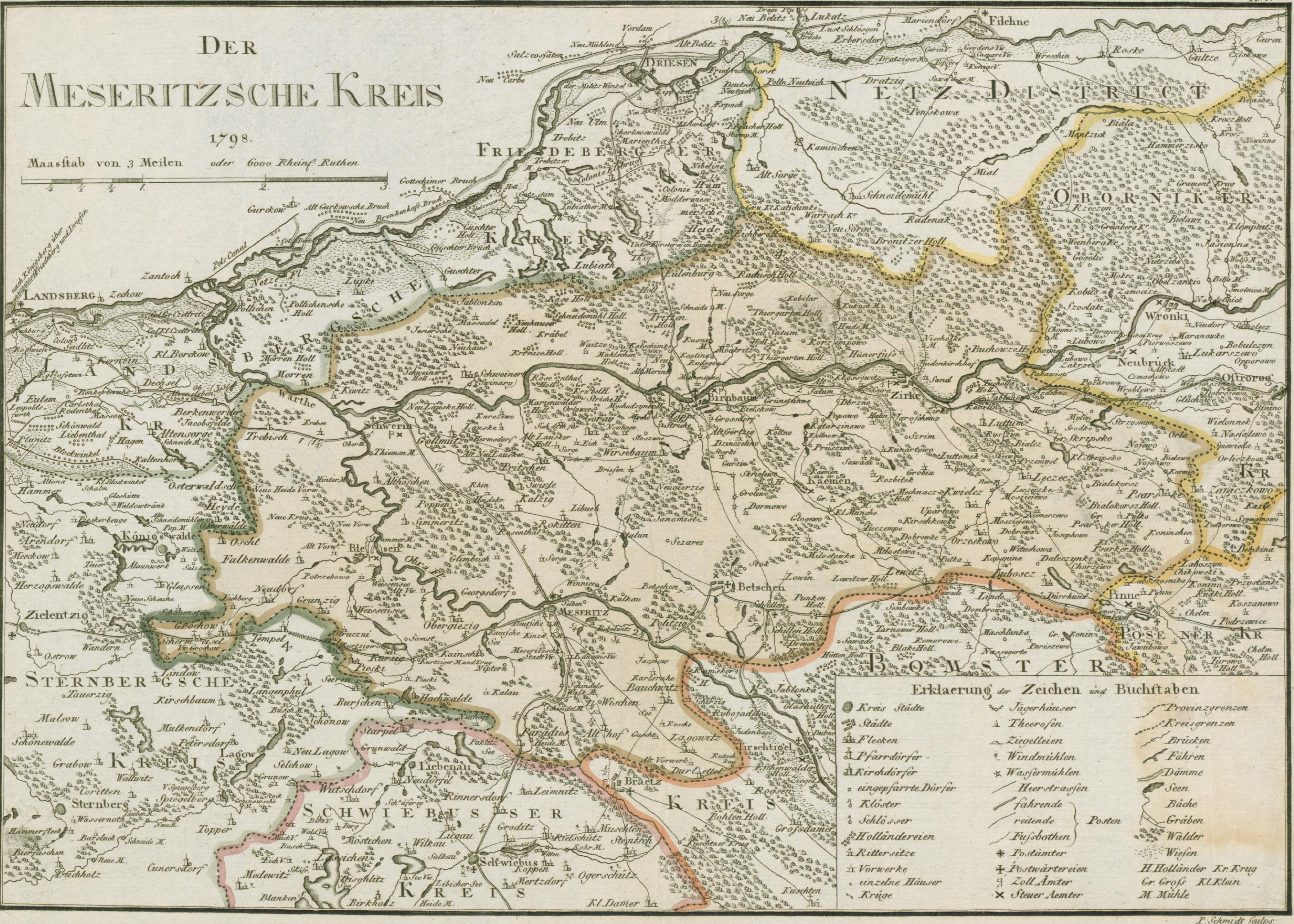 Kreis Meseritz as from 1818 to 1887